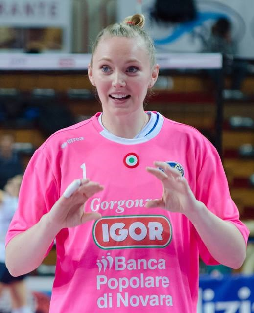 Pallavolista statunitense, gioca nel ruolo di schiacciatrice